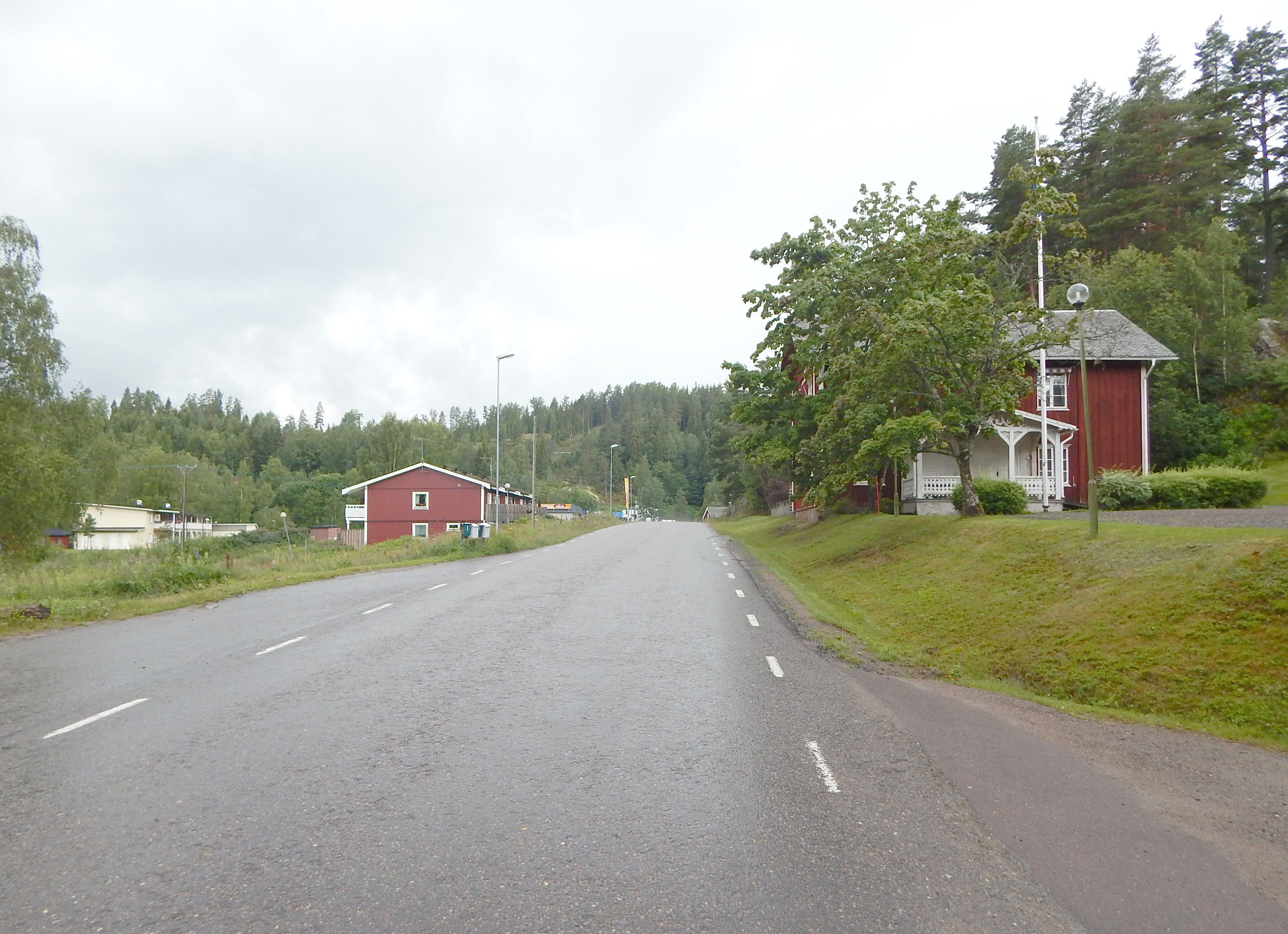 Sekundär länsväg S631 i Skillingsfors